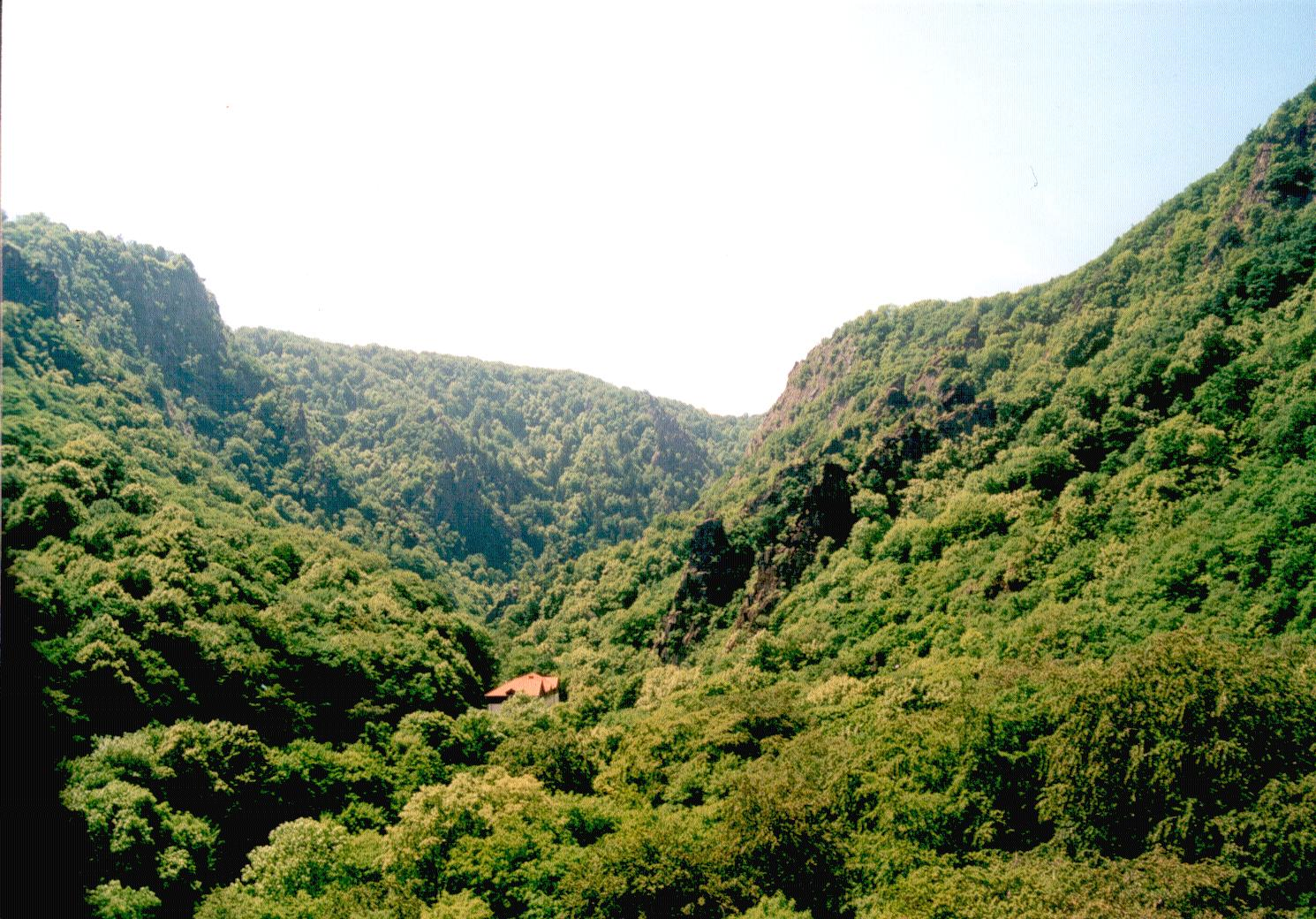 Blick aus der Seilbahn zum Hexentanzplatz in Richtung des Eingangs zur Bodeschlucht. Im Vordergrund die Jugendherberge und der Goethe- oder Siebenbrüderfelsen.